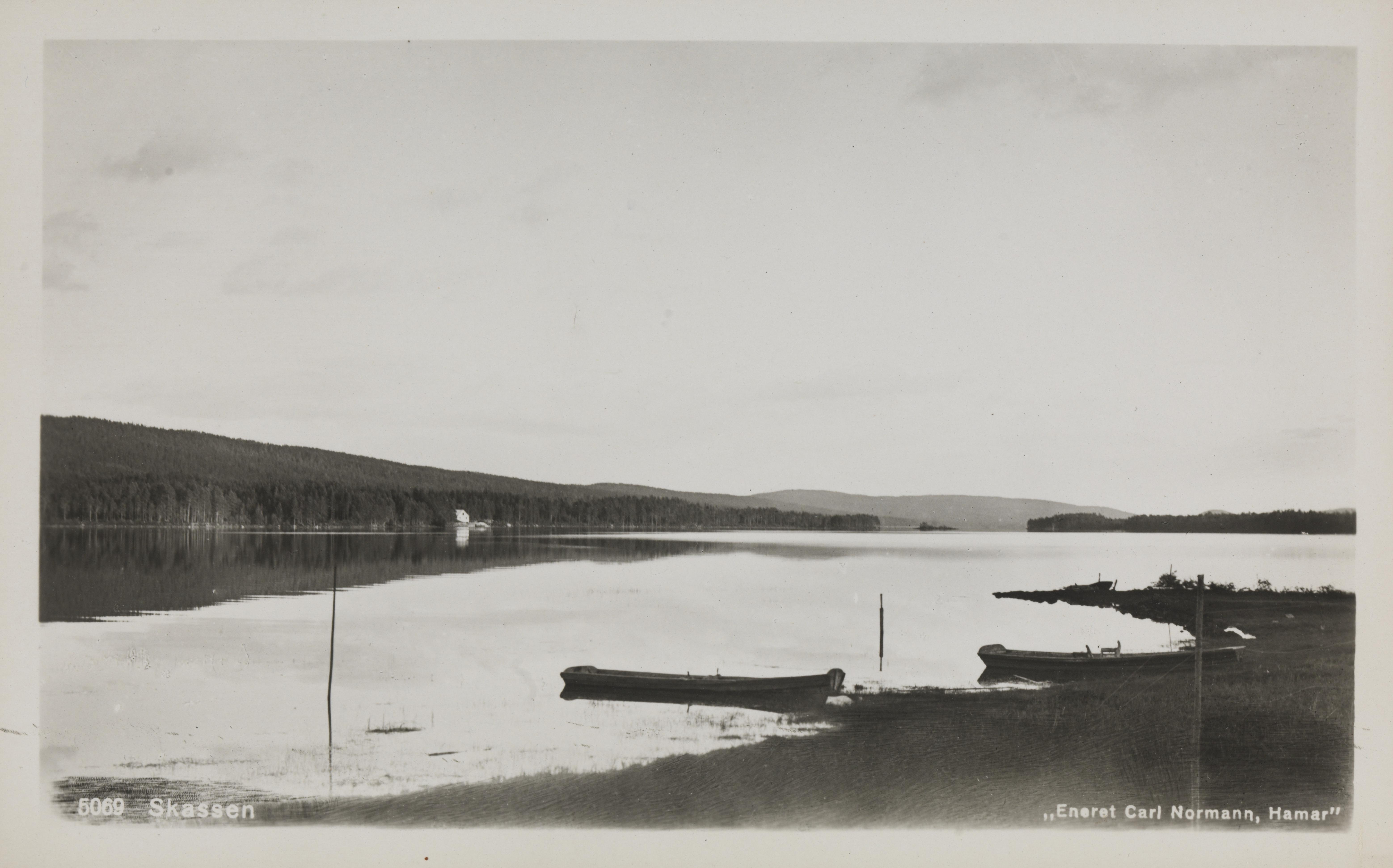 Bildet er hentet fra Nasjonalbibliotekets bildesamling Skasen, Grue, Hedmark